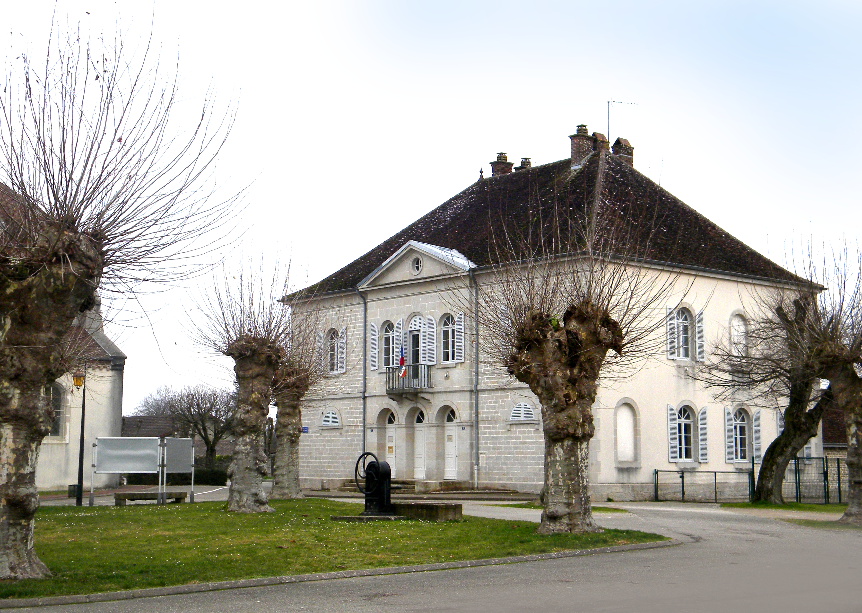 Urbodomo de Desnes